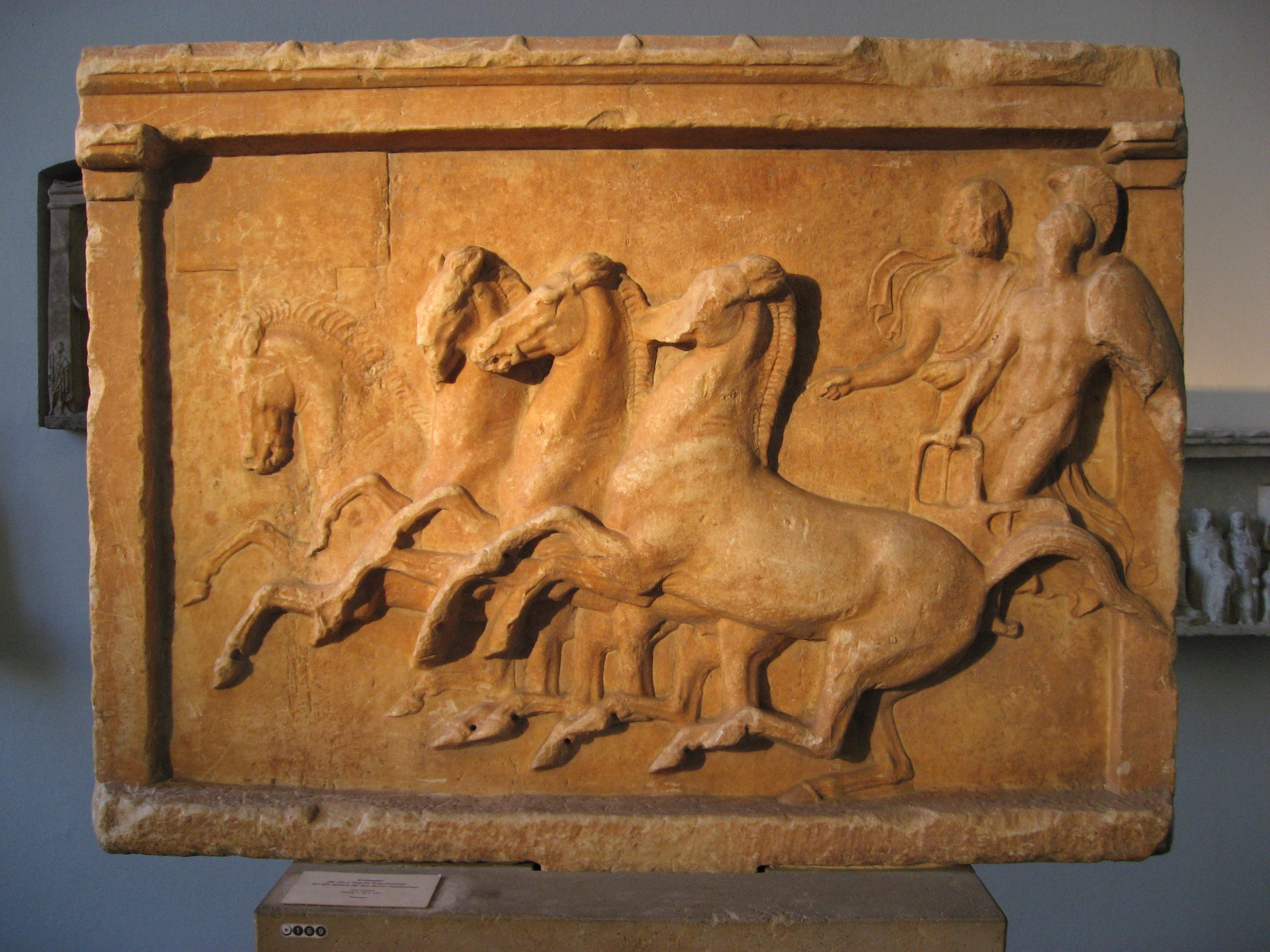 Weihrelief für einen Sieg im Wagenrennen bei den Spielen für den Heros Amphiaraos. Aus Oropos, Anfang des 4. Jh. v. Chr. Marmor